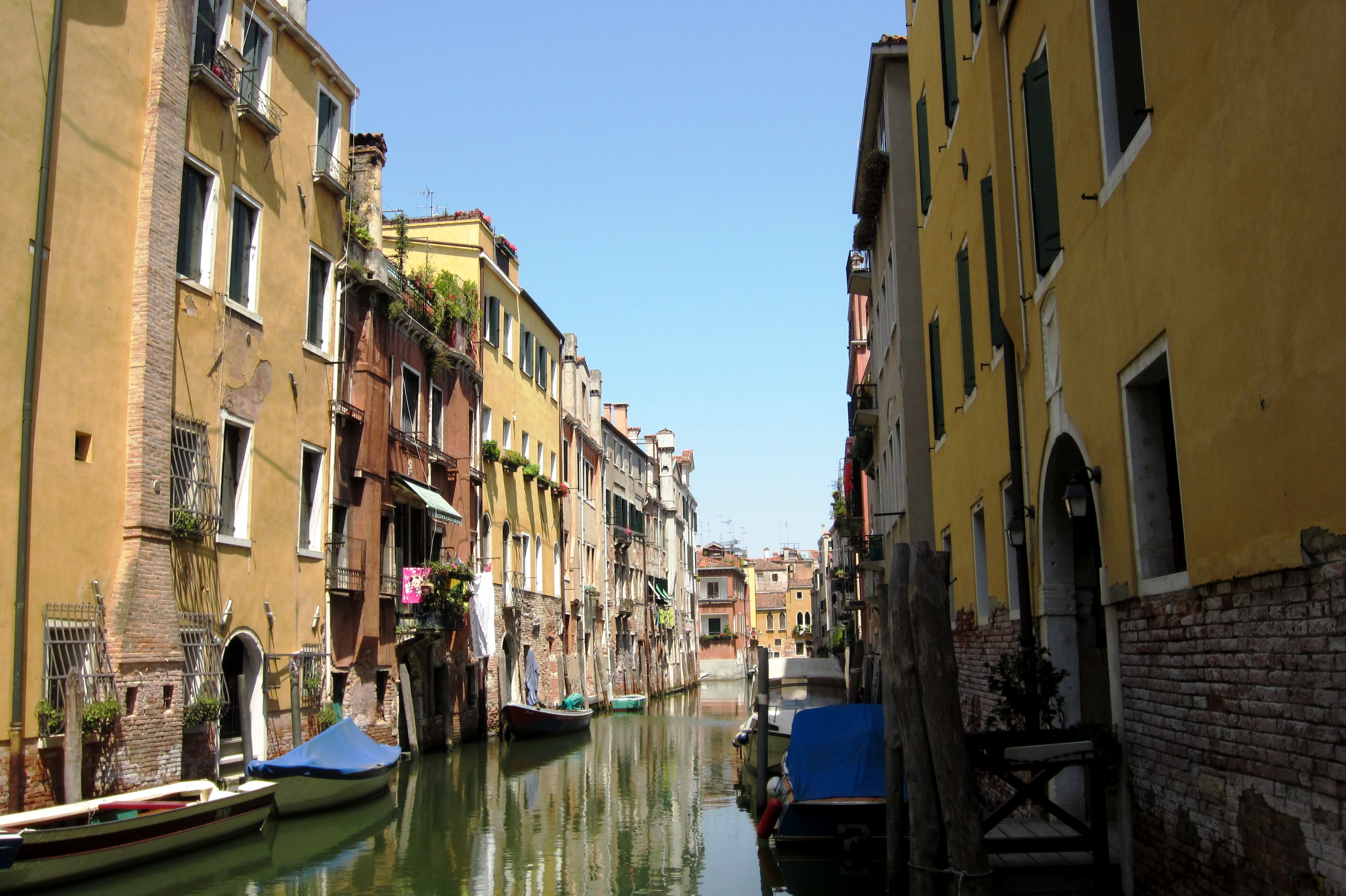 Die Haupterschließung der Einwohner erfolgt traditionell per Boot